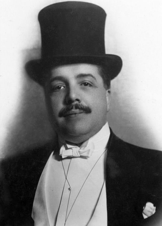 Сергей Павлович Дягилев